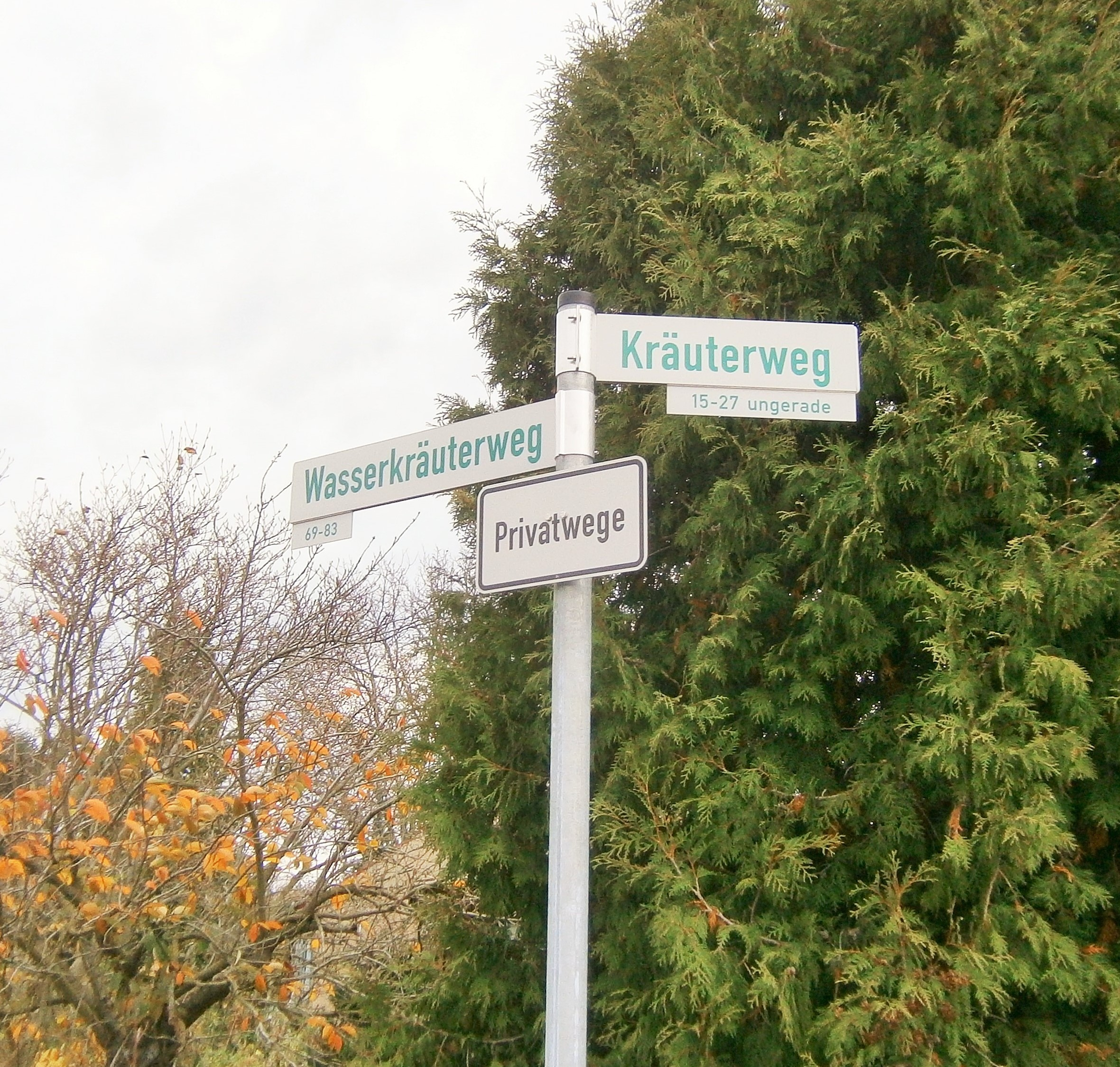 Kräuterweg in Berlin-Rosenthal ist eine neu benannte Privatstraße. Hier Straßenschild Ecke Wasserkräuterweg.